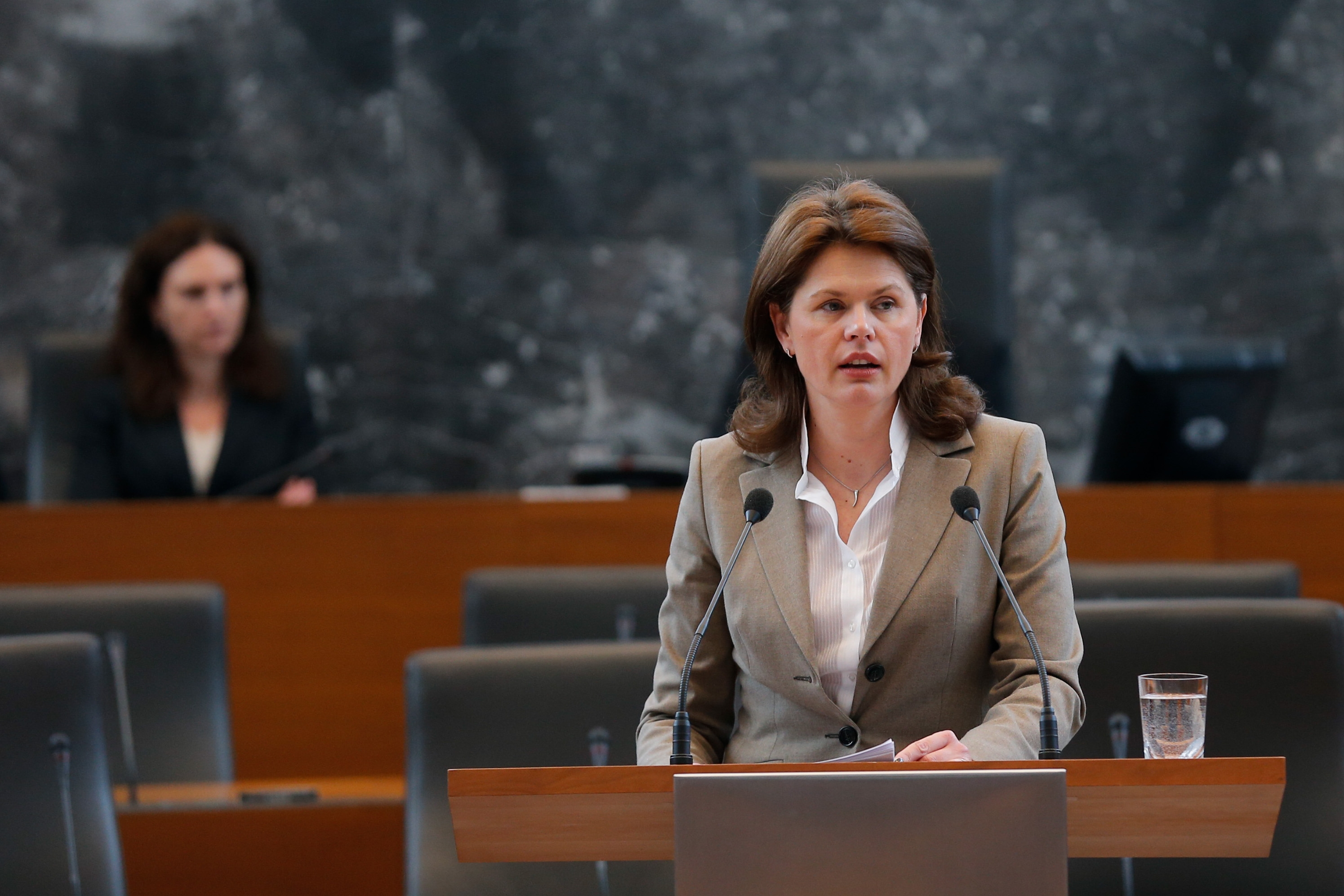 Nastop predsednice vlade Alenke Bratušek v Državnem zboru